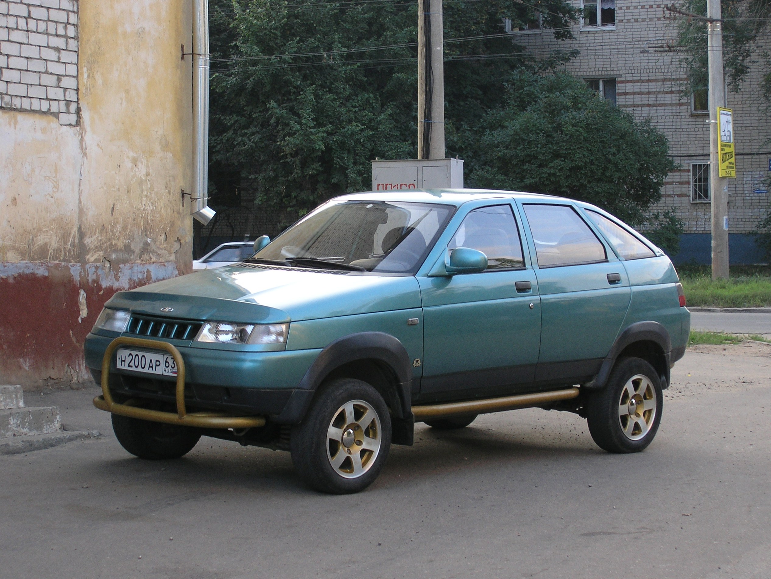 Лада111-90 ("Тарзан-2")